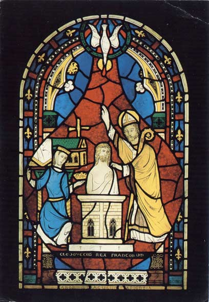 vitrail